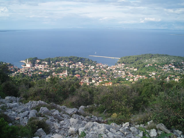 Veli Lošinj